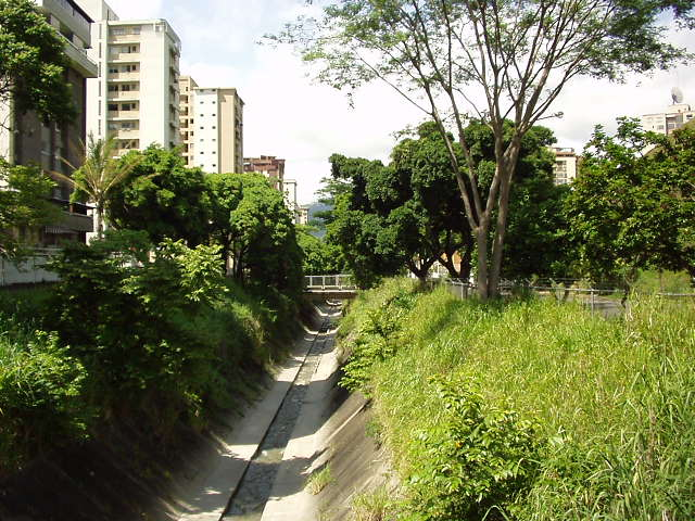 Rio Caurimare Caracas - Venezuela Nota: Tome la imagen de esta fuente Venciclopedia: Rio Caurimare.jpg se señala lo siguiente: Esta imagen ha sido liberada al dominio público por su autor. Esto aplica en todo el mundo, pero en algunos países esto no es posible, si ese es el caso: el autor concede a cualquier persona el derecho de usar este trabajo para cualquier propósito, sin condiciones, a menos que dichas condiciones sean requeridas por la ley.